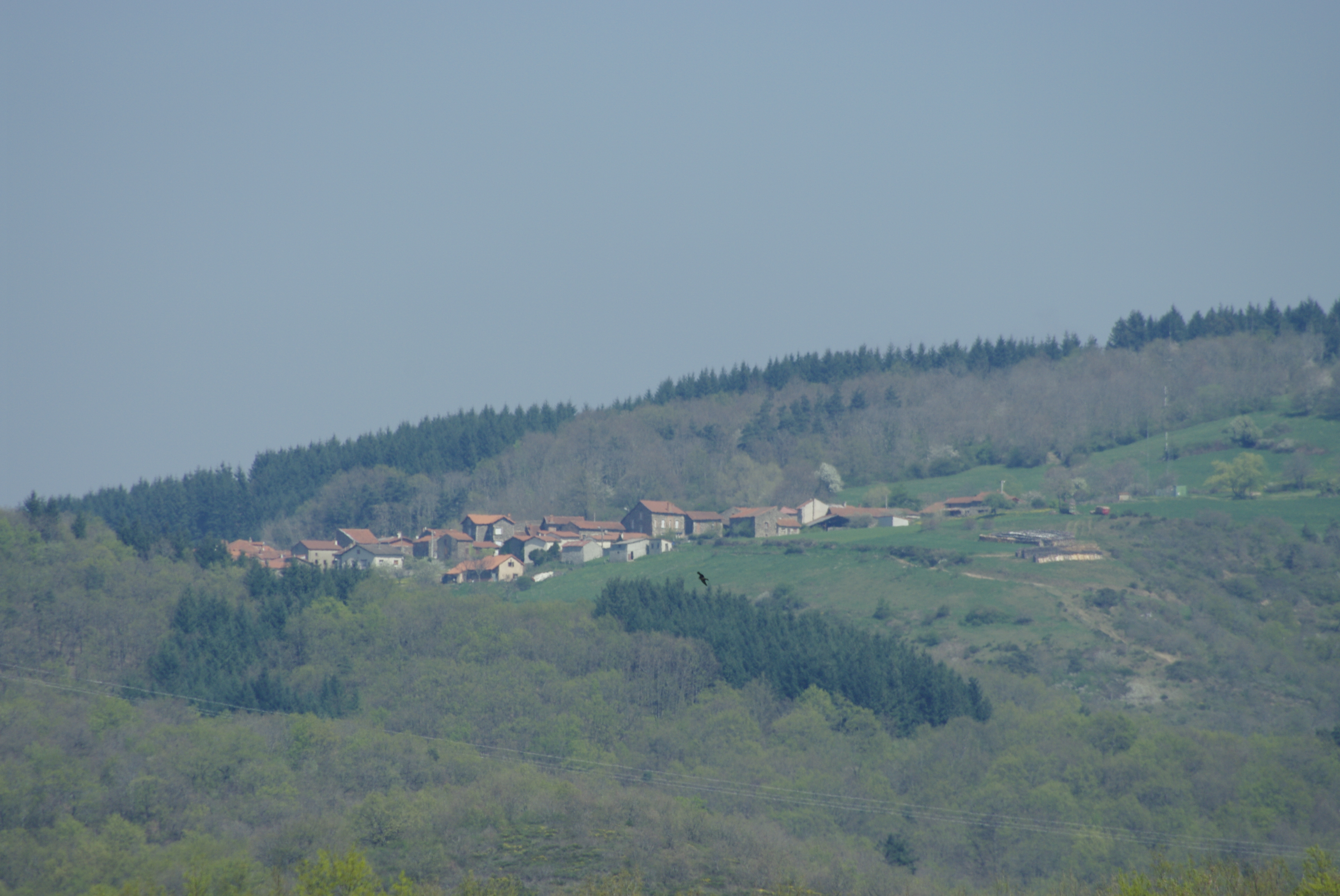 Vue sur la commune d'Esteil depuis le château d'eau de Brassac-les-Mines.